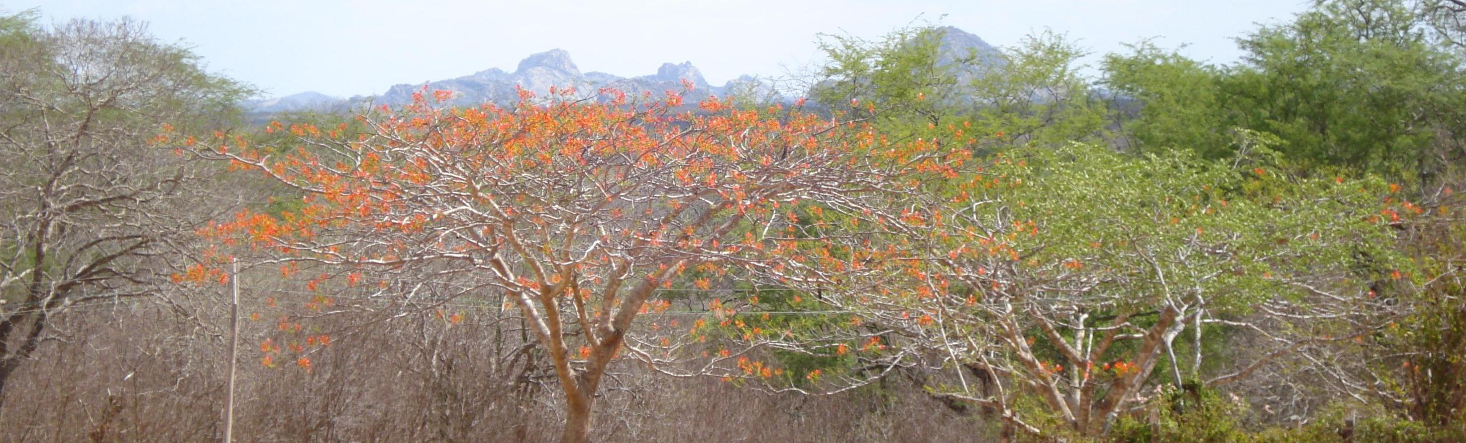 Paisagem da reserva particular do patrimônio Natural "Fazenda Não Me Deixes", Quixadá, ceará, Brasil.